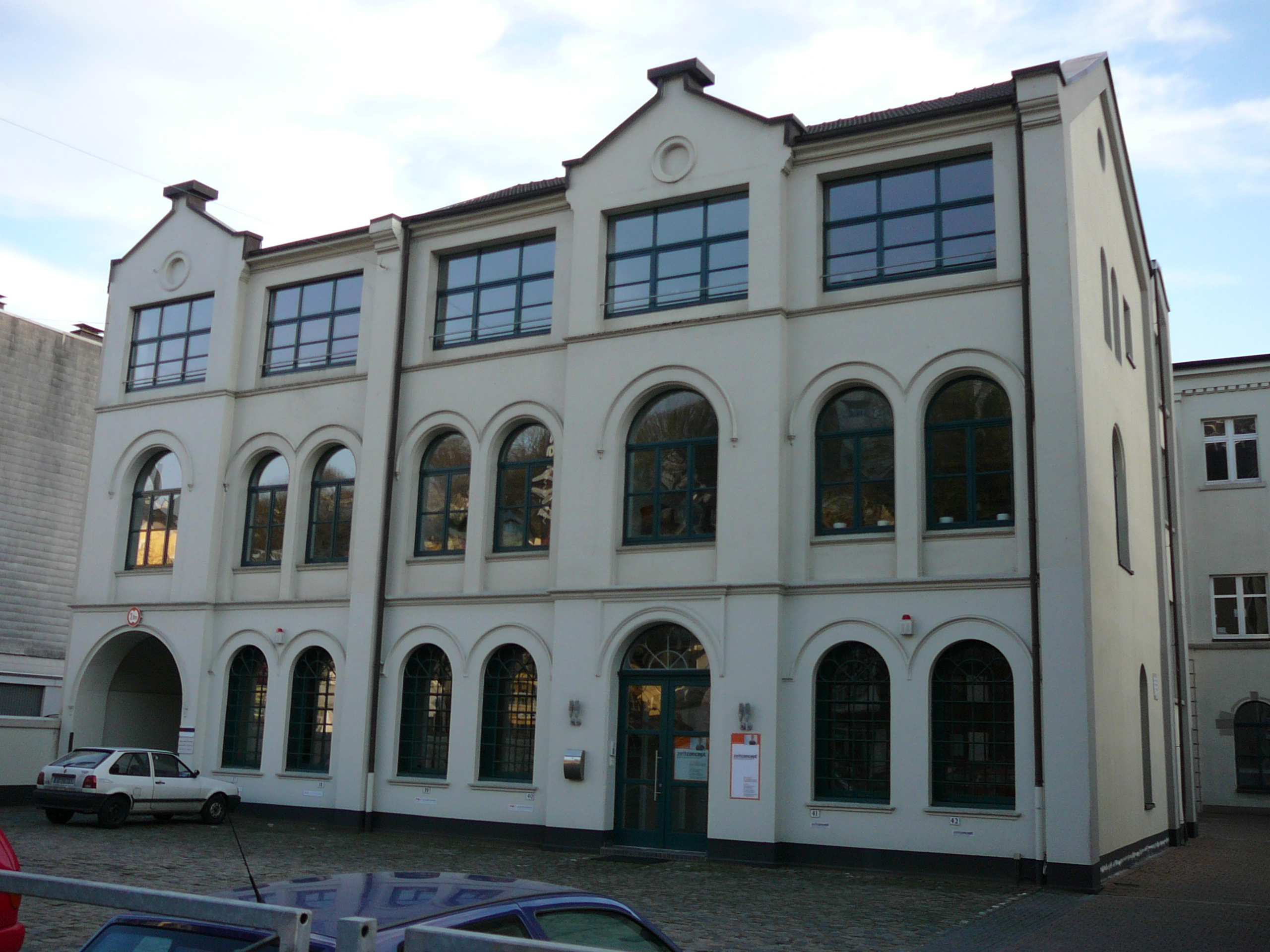 Friedrich-Ebert-Str., Wuppertal